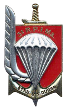 Insigne régimentaire du 3e régiment parachutiste d'infanterie de marine (3e RPIMa)